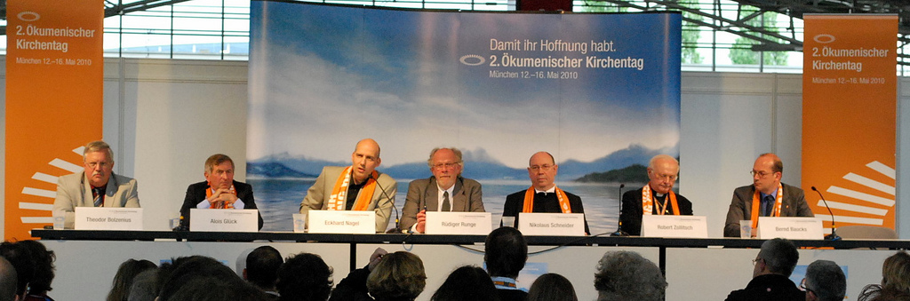 Pressekonferenz im Pressezentrum, unter anderem mit Nikolaus Schneider, Robert Zollitsch, Eckhard Nagel und Alois Glück